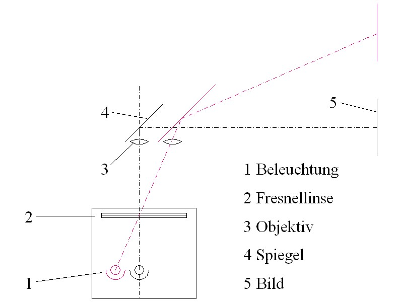 Projektor, Lens Shift am OHP, Trainer 400 KC, ab 1990, Lampe 36V 400W, später mit fest positioniertem Objektiv für maximale Schrägprojektion